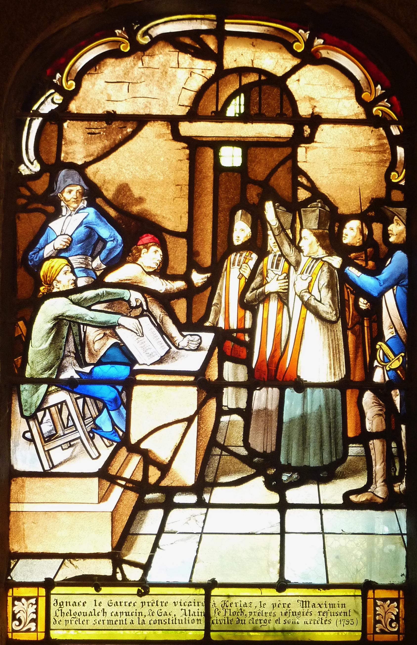 Kerlaz : église paroissiale Saint-Germain, vitrail de Gabriel Léglise représentant le prêtre Ignace Le Garrec, ainsi que Maximin L'Helgouarc'h, capucin, et les abbés Charles Le Gac et Alain Le Floc'h, arrêtés pour avoir refusé de prêter serment à la Constitution civile du clergé en 1793.